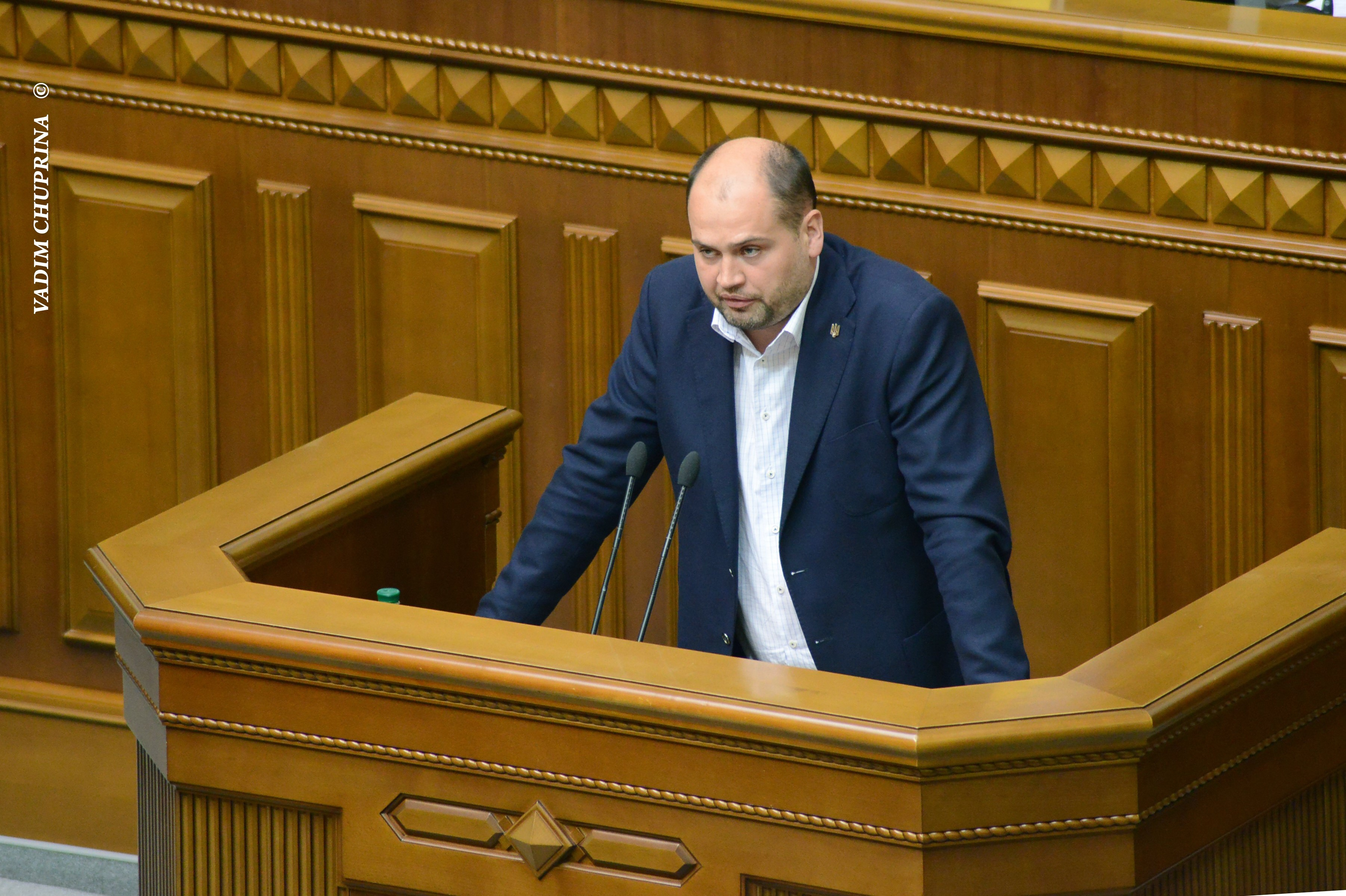 ВЕРХОВНА РАДА УКРАЇНИ 2015 фотограф Вадим Чуприна